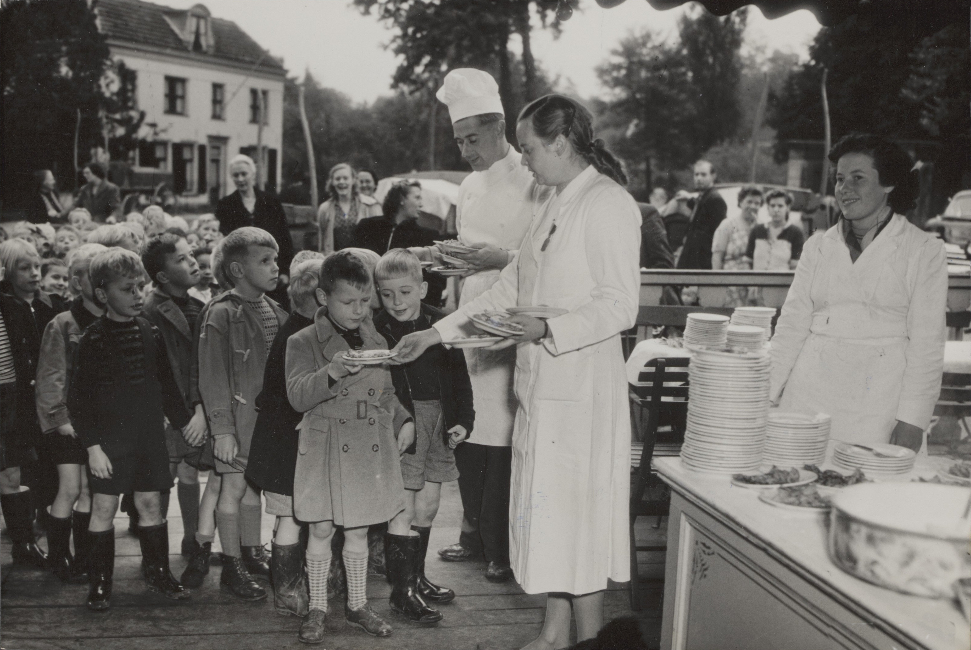 Collectie / Archief : Fotocollectie Elsevier Reportage / Serie : [ onbekend ] Beschrijving : Kinderen uit Breukelen krijgen poffertjes op de jaardag van Leonard Corneille Dudok de Wit (1843-1913), alias Kees de Tippelaar Datum : 3 oktober 1952 Locatie : Breukelen, Utrecht Trefwoorden : kinderen, poffertjes, scholen, tractaties, poffertjesdag Persoonsnaam : Dudok de Wit, Leonard Corneille, Tippelaar, Kees de Fotograaf : Fotograaf Onbekend / Anefo Auteursrechthebbende : Nationaal Archief Materiaalsoort : Foto (zwart/wit) Nummer archiefinventaris : bekijk toegang 2.24.05.02 Bestanddeelnummer : 049-0724